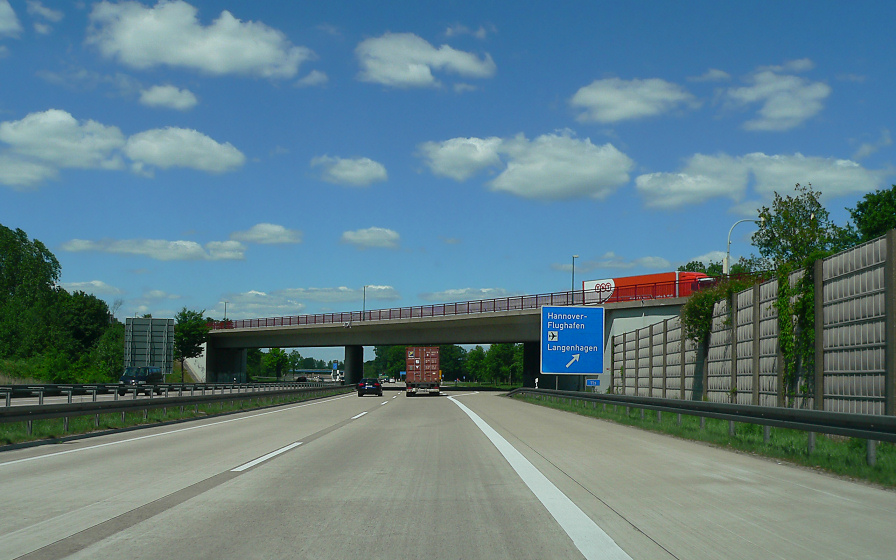 A 352 beim Flughafen Hannover